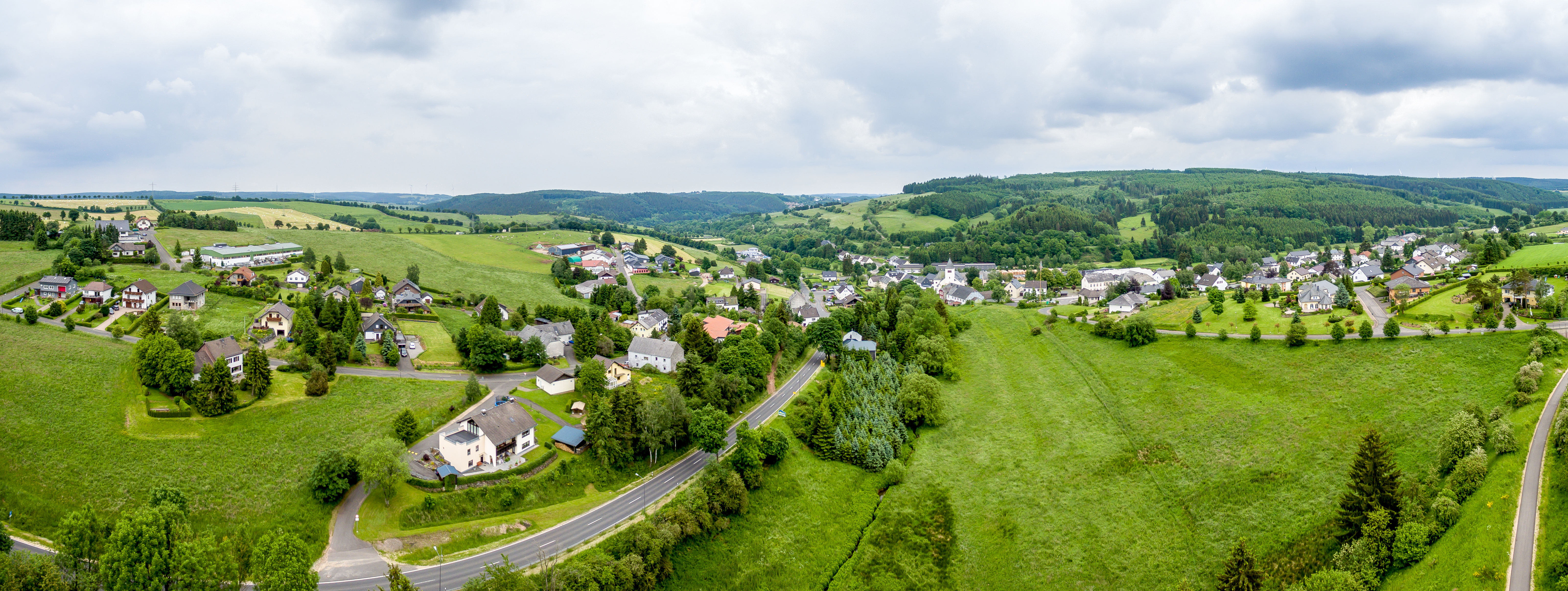 Luftaufnahme von Hallschlag, Landkreis Vulkaneifel, von Westen. Die Bundesstraße 421 führt durch Hallschlag, rechts außen ist ein Stück des Radweges der ehemaligen Vennquerbahn zu sehen